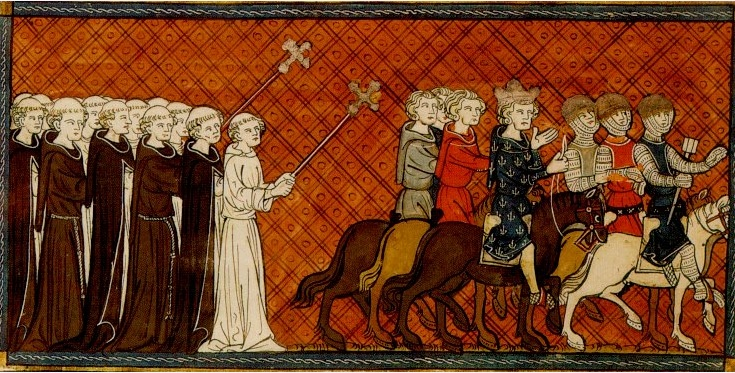 Ludvík IX a sedmá kruciáta